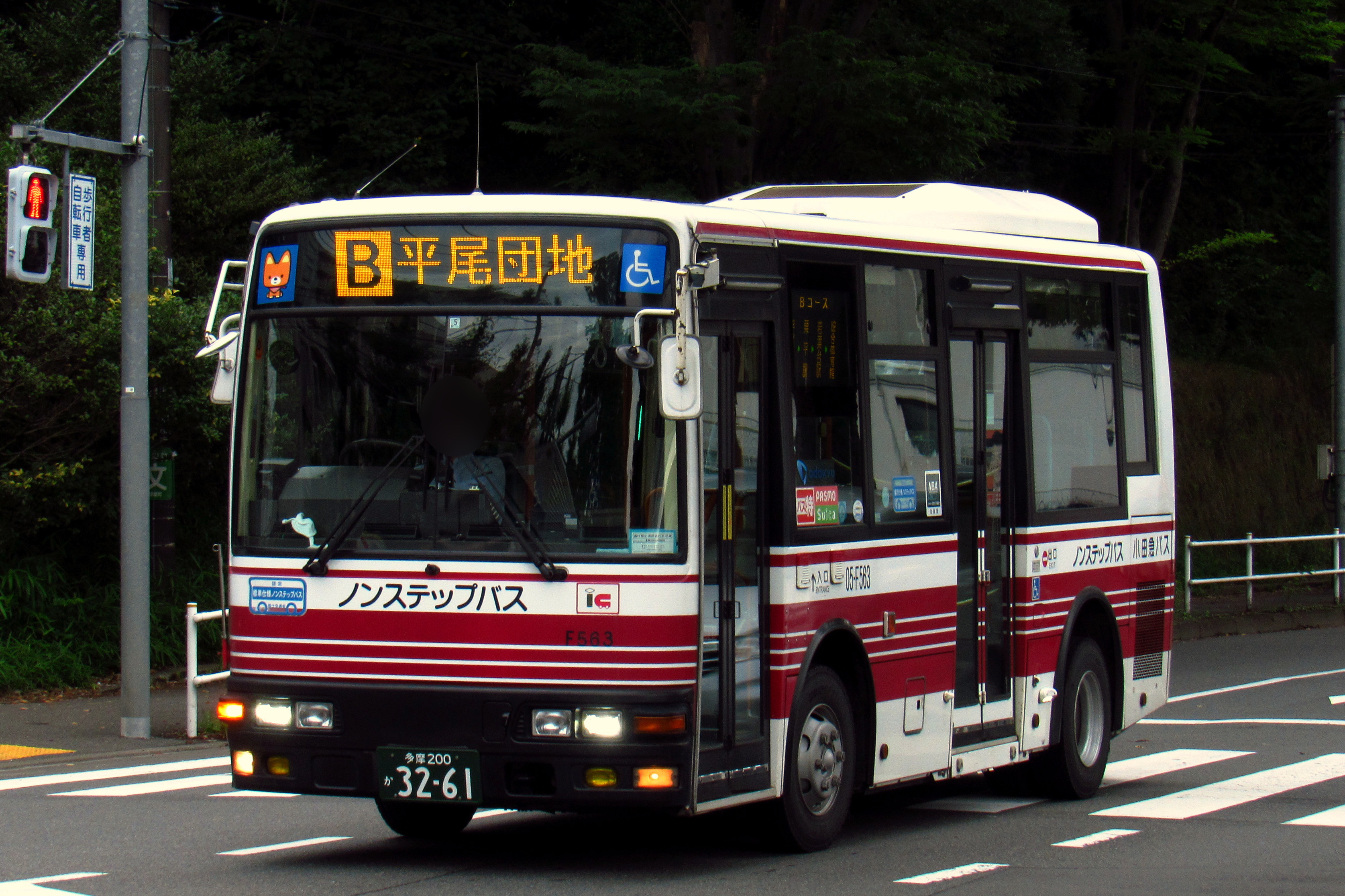 iバスの増発便に使用されるコミュニティバス共通予備車（05-F563）